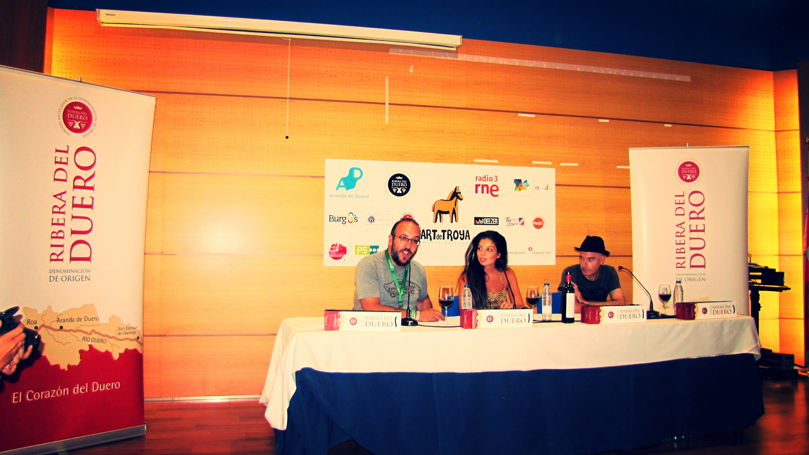 Rueda de Prensa de Soleá Morente y los Evangelistas, durante el Festival Sonorama Ribera 2013, junto con Javier Ajenjo (izq), director del Festival, y Antonio Arias (derecha) de Lagartija Nick y Los Evangelistas.